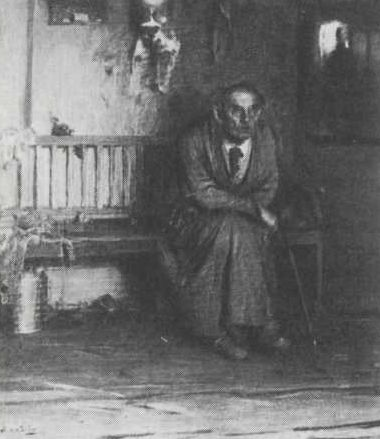 Portrait de Iegor Khrouslov par Abram Arkhipov - Reproduction en noir et blanc - Date non connu